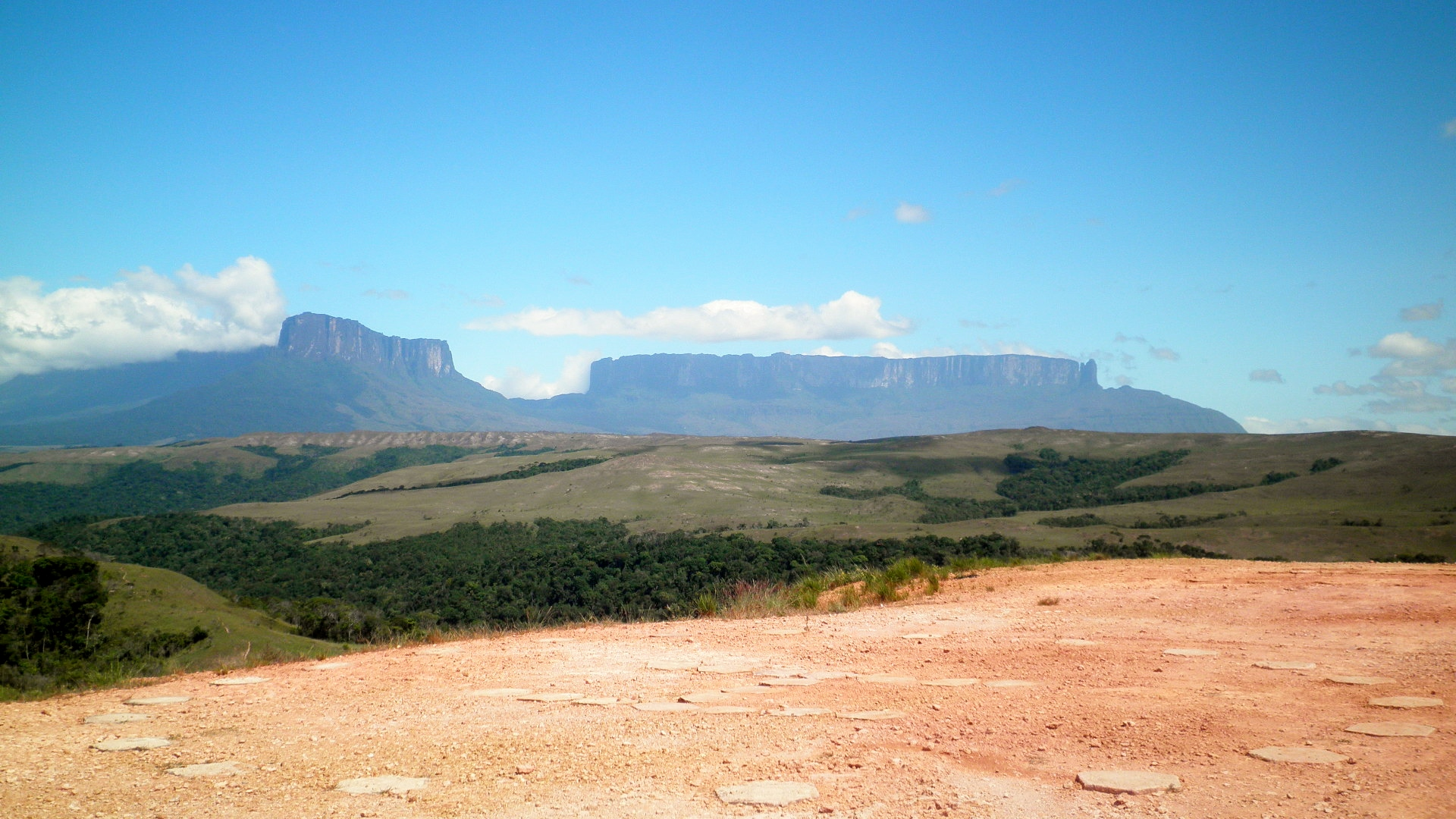 La vista que se puede apreciar desde el Paraitepuy hacia el Roraima.